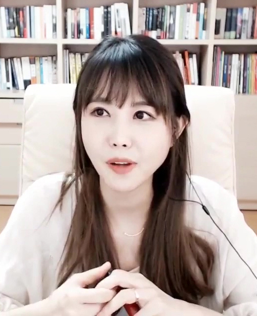 윰댕] 요리 컨텐츠를 대하는 대도서관님의 자세 (a.k.a대찡찡)